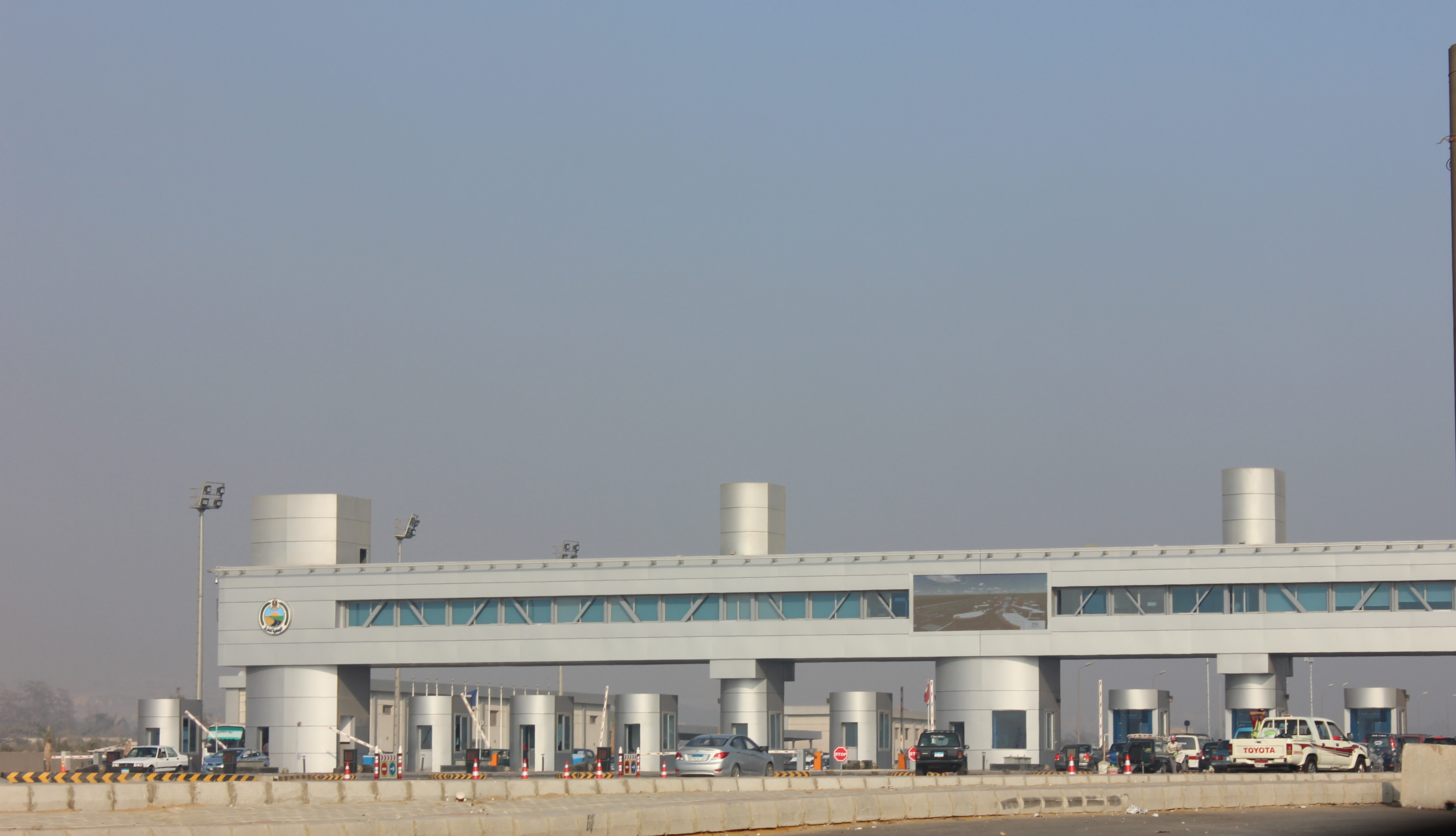 كارتة عبور الطريق في الكيلو 29 طريق مصر الإسكندرية الصحراوي.